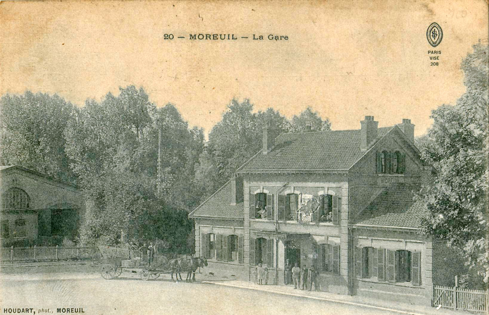 Carte postale ancienne éditée par D. A. Longuet à Paris, n°20 et mention de censure 208 à Paris :MOREUIL - La Gare